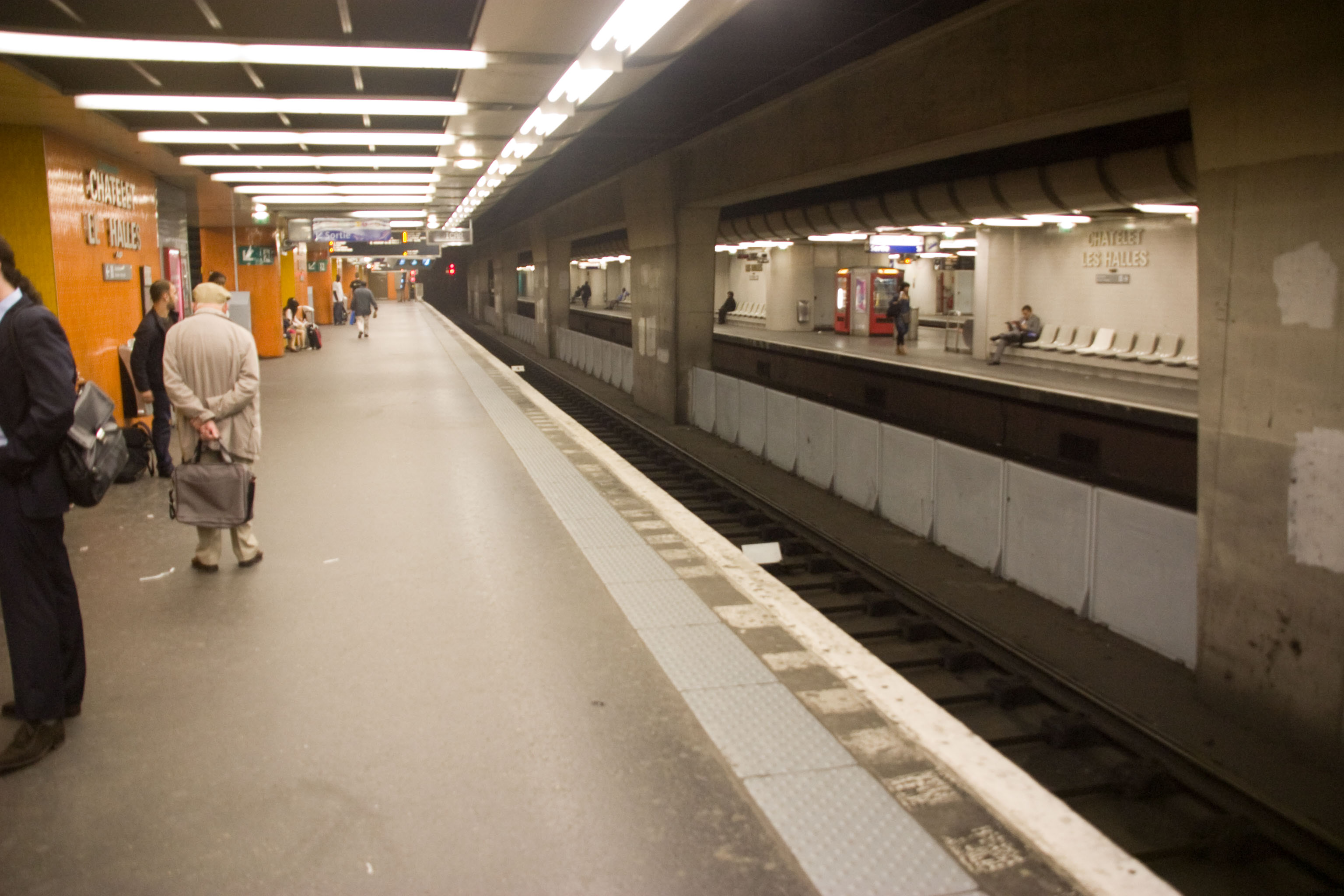 Station Châtelet - Les Halles, Paris, France